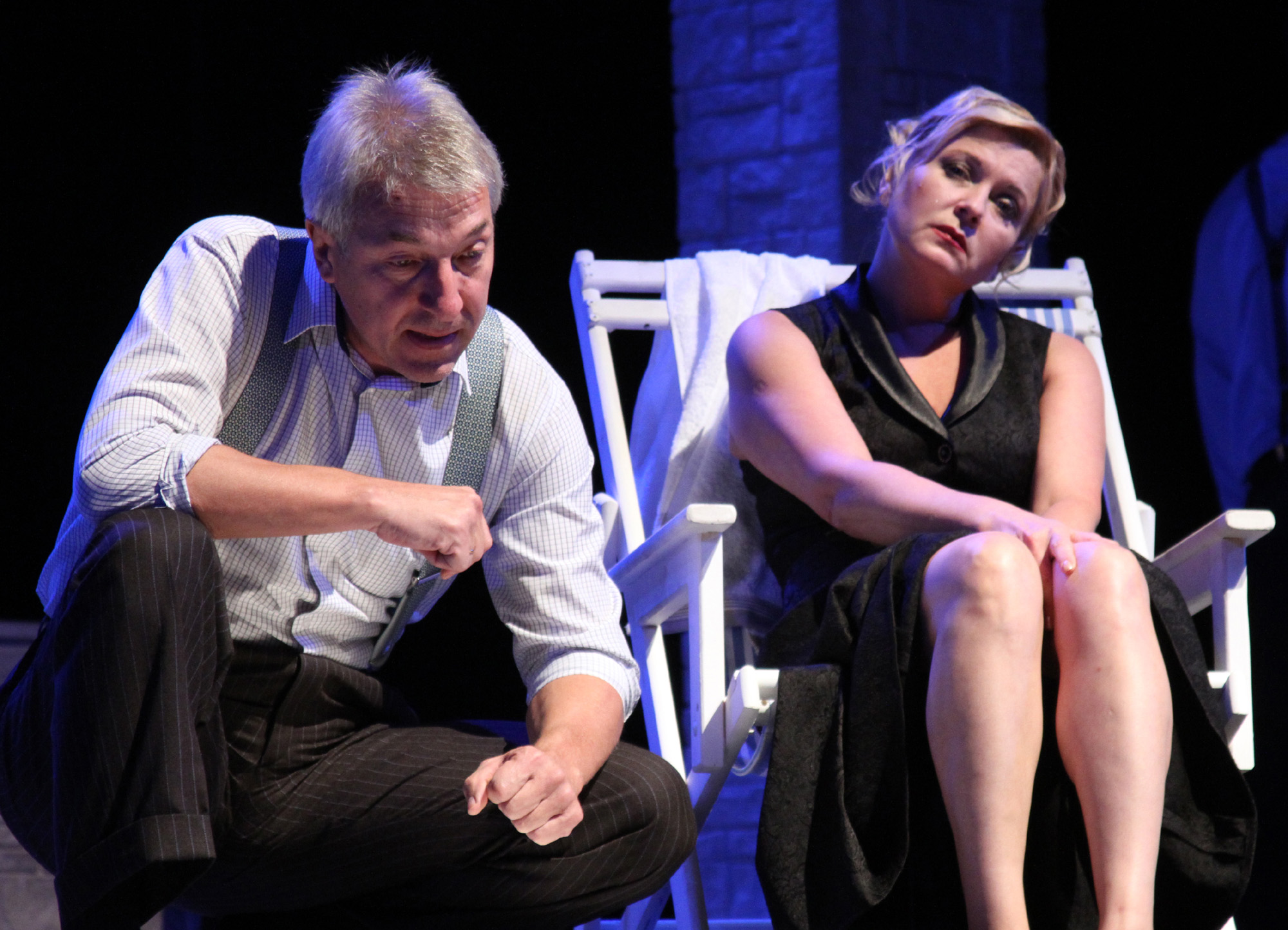 Сцена из спектакля Саратовского академического театра драмы «Все мои сыновья» по пьесе Артура Миллера. Актёры Юрий Кудинов и Эльвира Данилина.